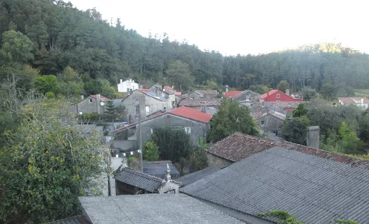 Souto, Rois